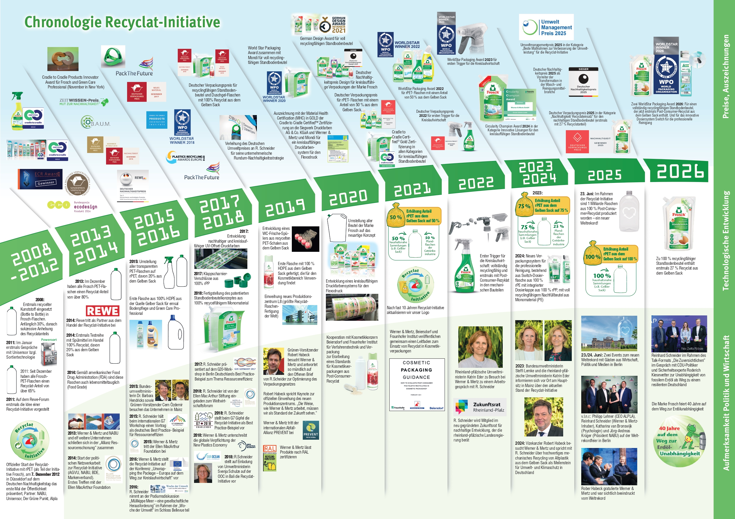 Chronologie der Werner & Mertz Recyclat-Initiative Status April 2020